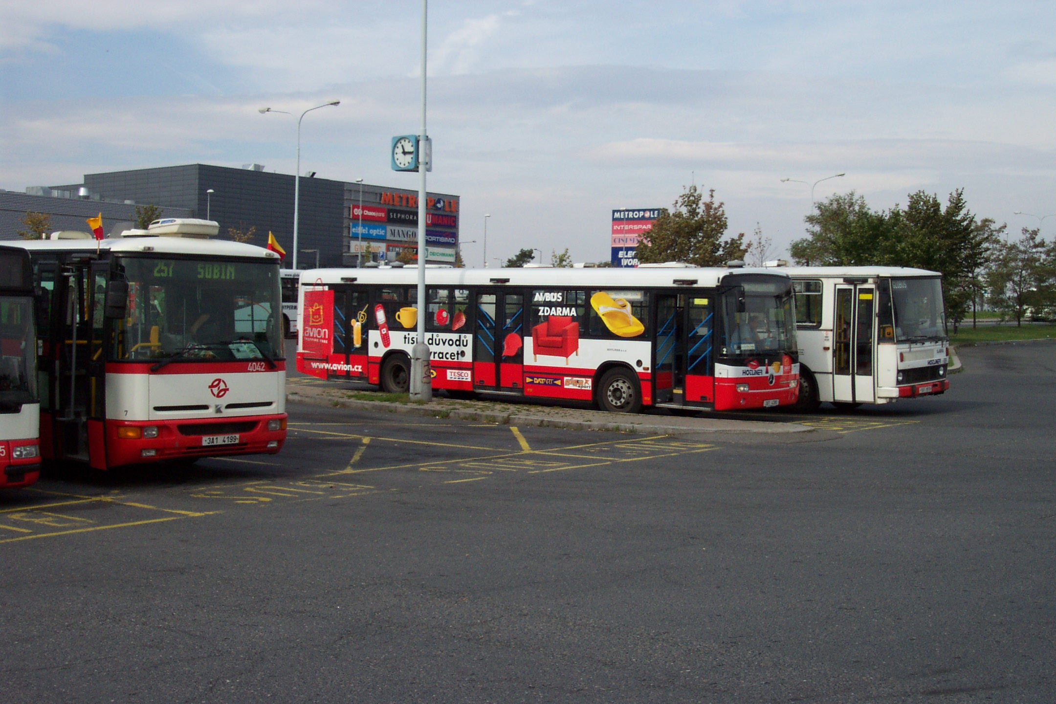 Buses at Prague-Zličín - Autobusy v Praze na Zličíně